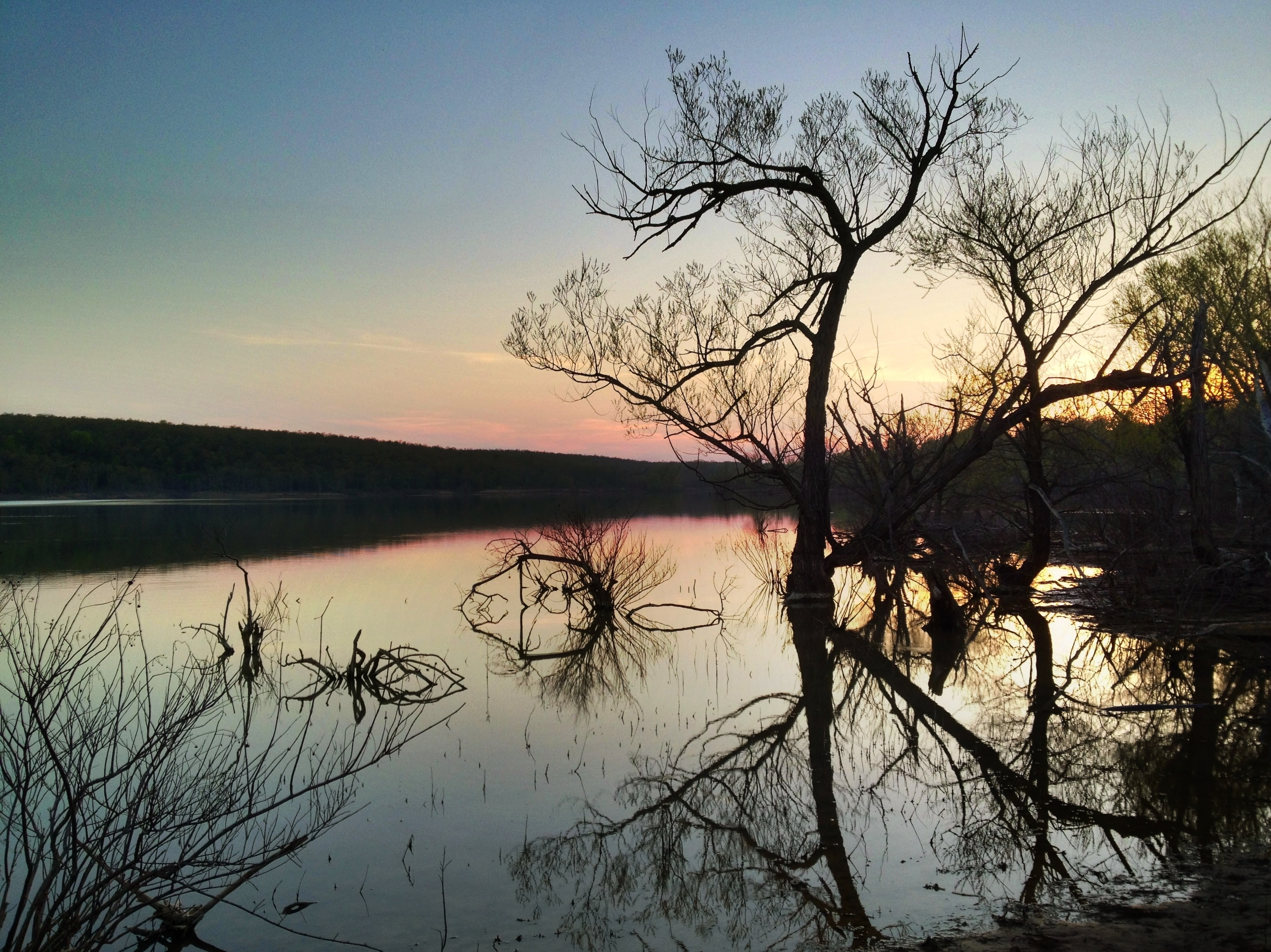 Canadian, OK